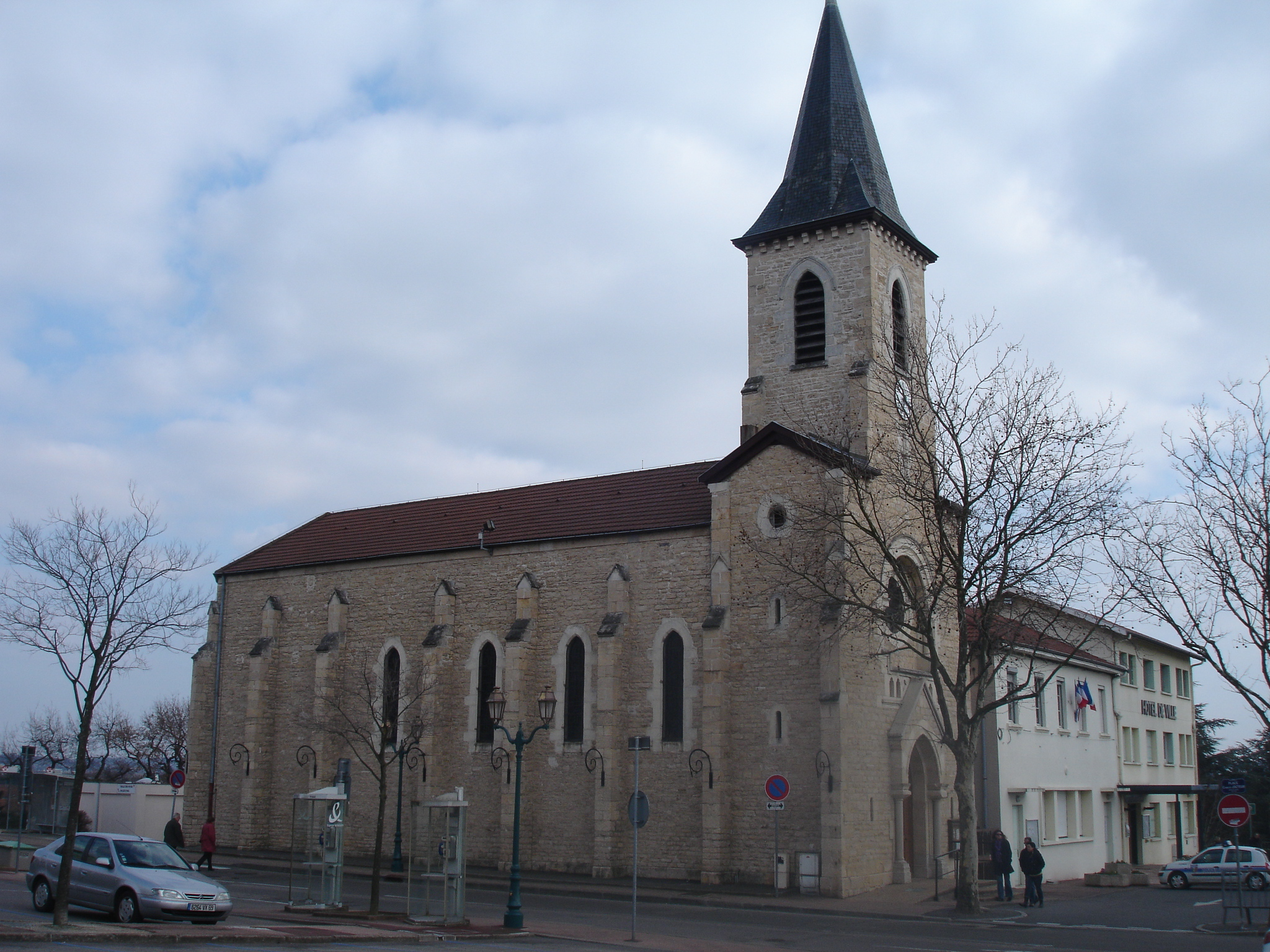 Corbas (69) : l'église